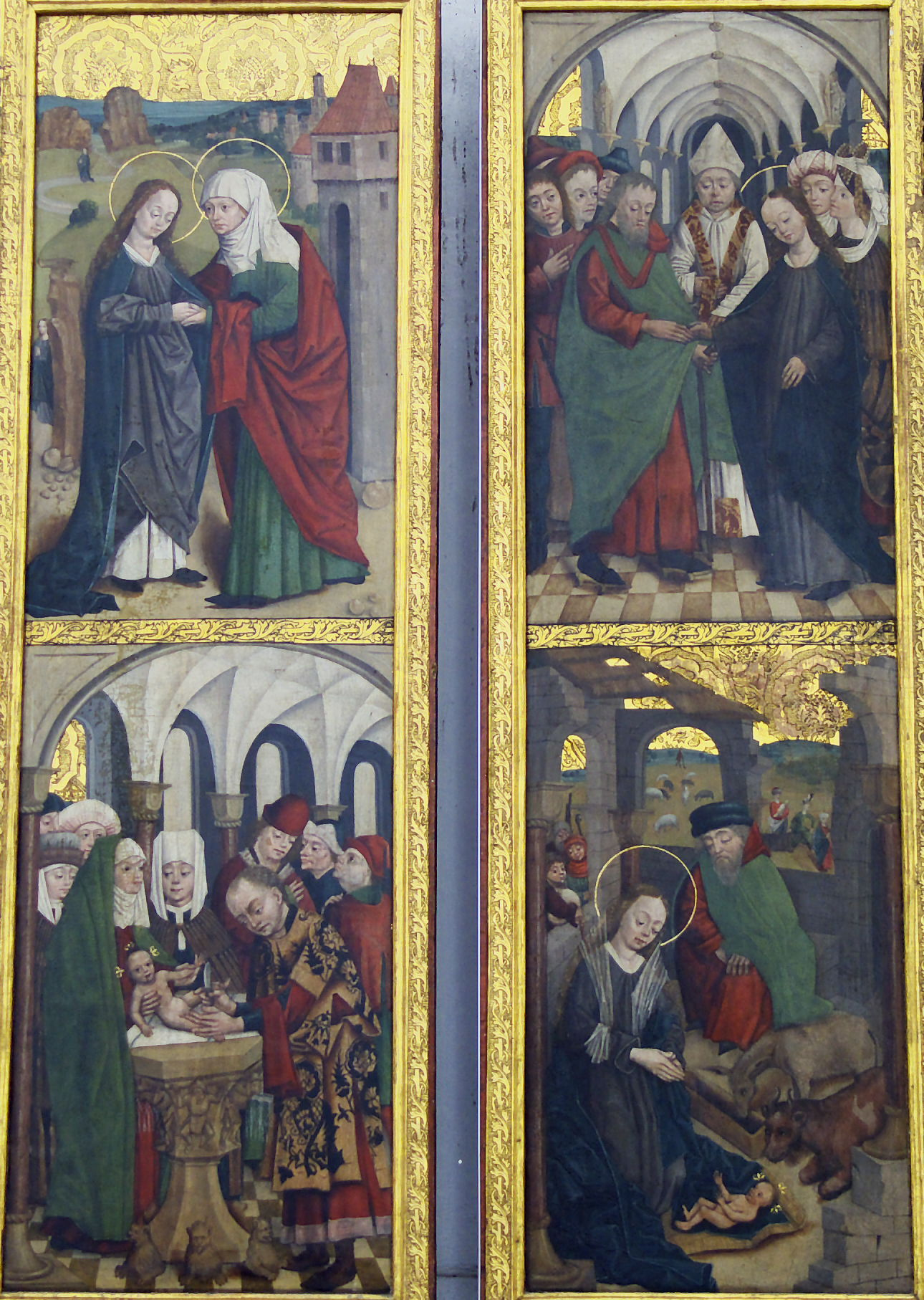 4 sceny z życia Maryi.